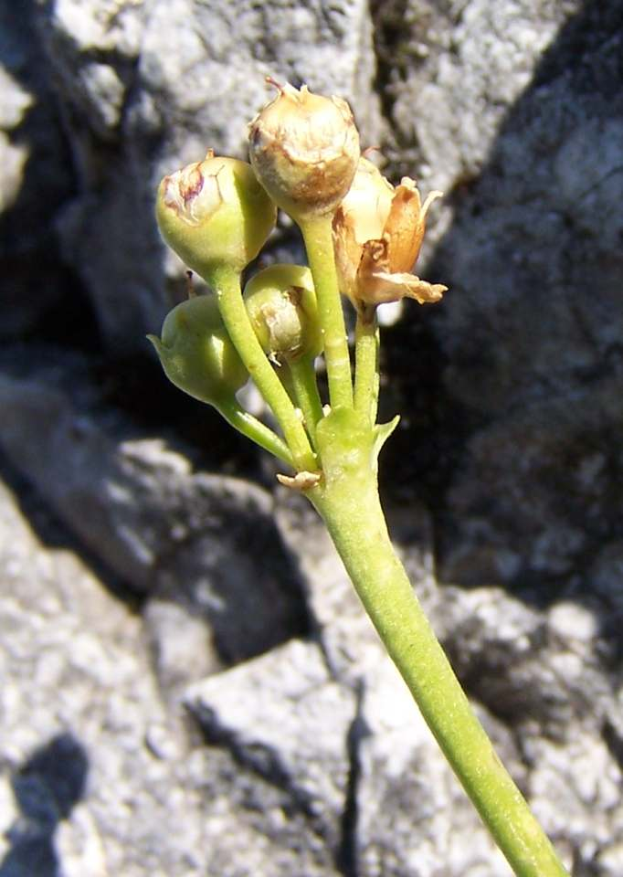 Primula auricula, fruits (pl. pierwiosnek łyszczak), habitat: West Tatra Mountains, Adamica